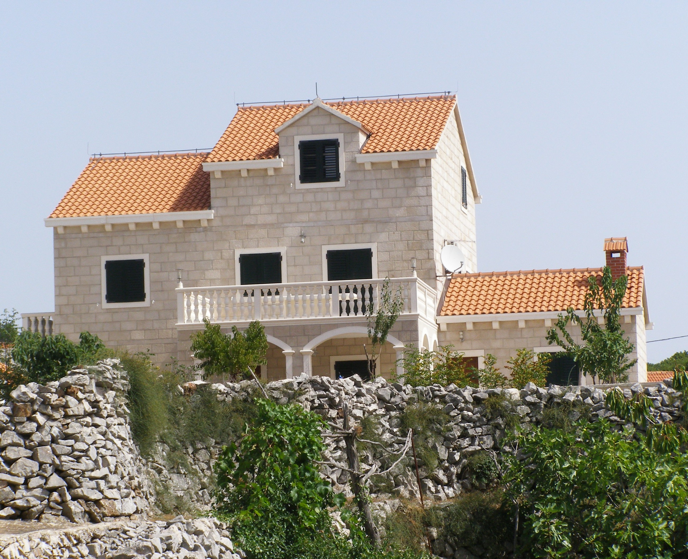 Gornji Humac, Brac, Croatia